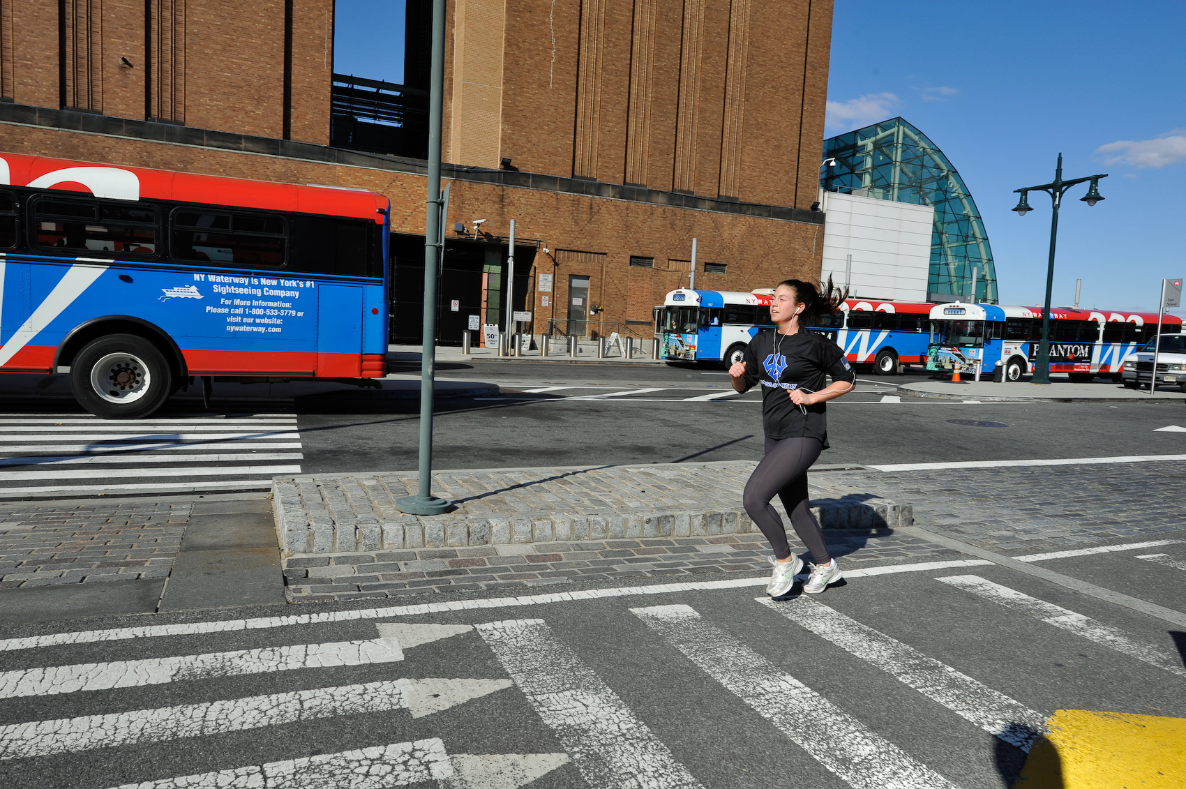 Veterans Day 2008